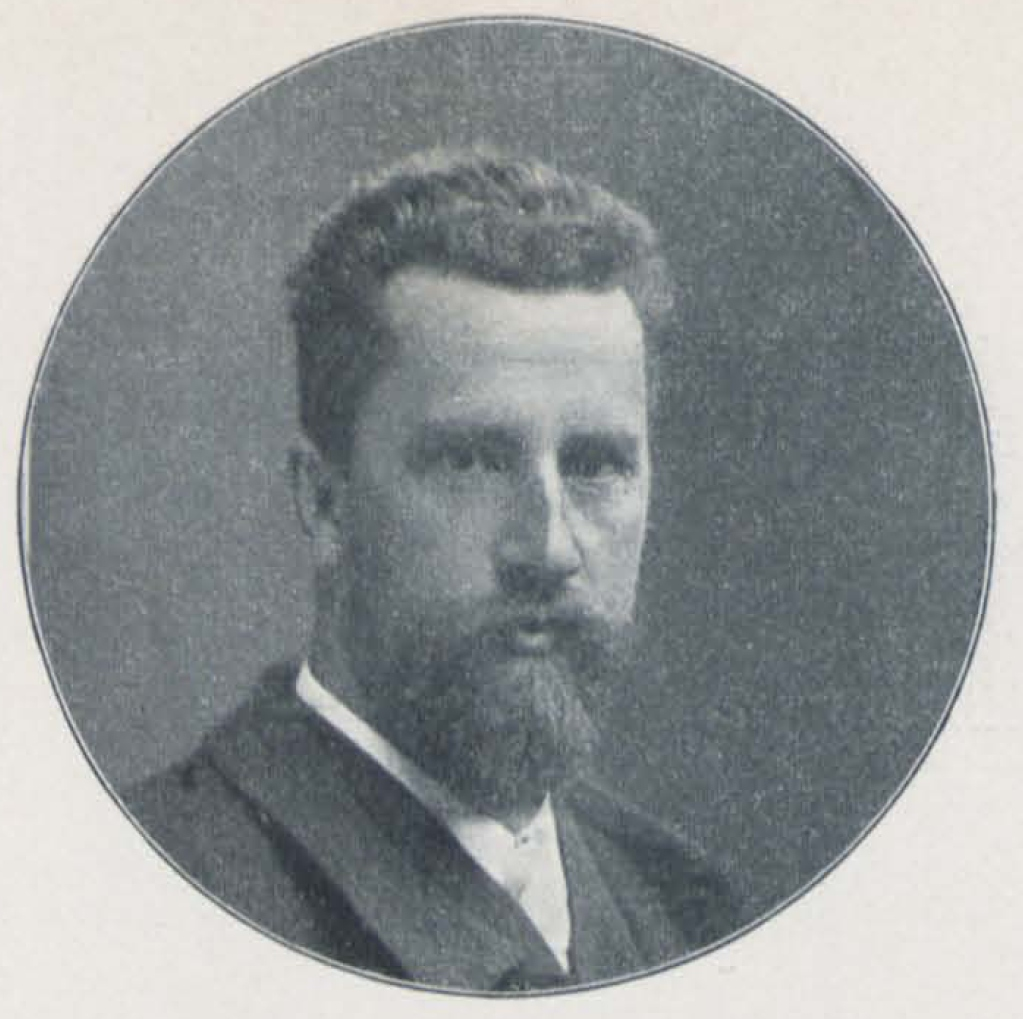 Max Kruse-Lietzenburg, deutscher Bildhauer, aufgenommen 1899.